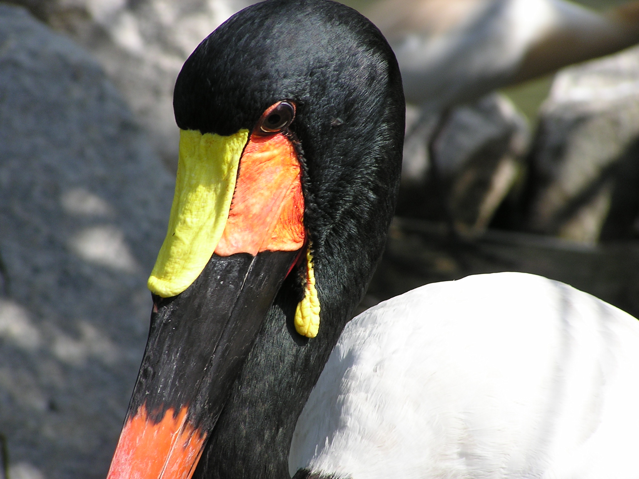 Kopf des Sattelstorches